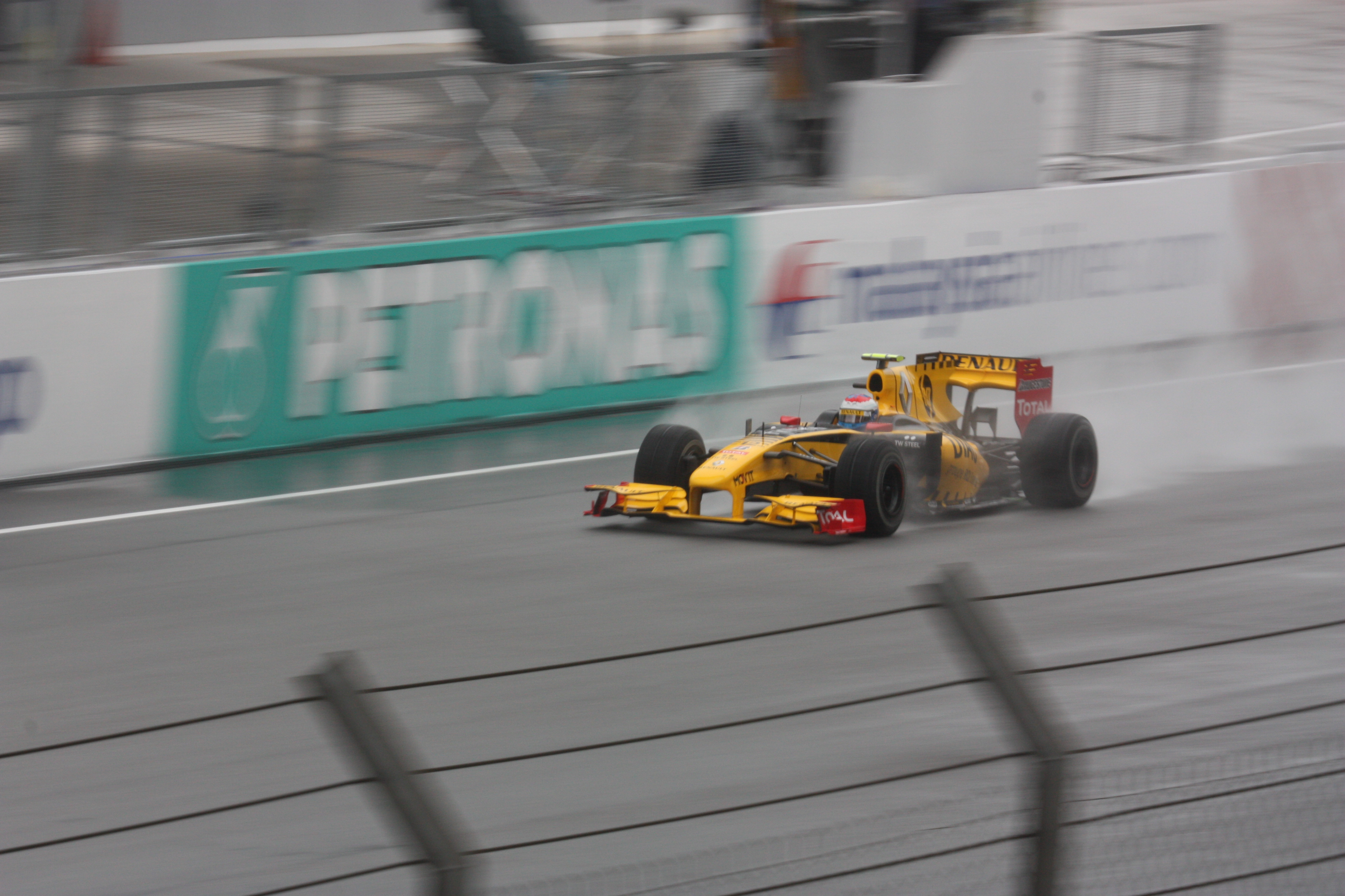 Petrov qualy